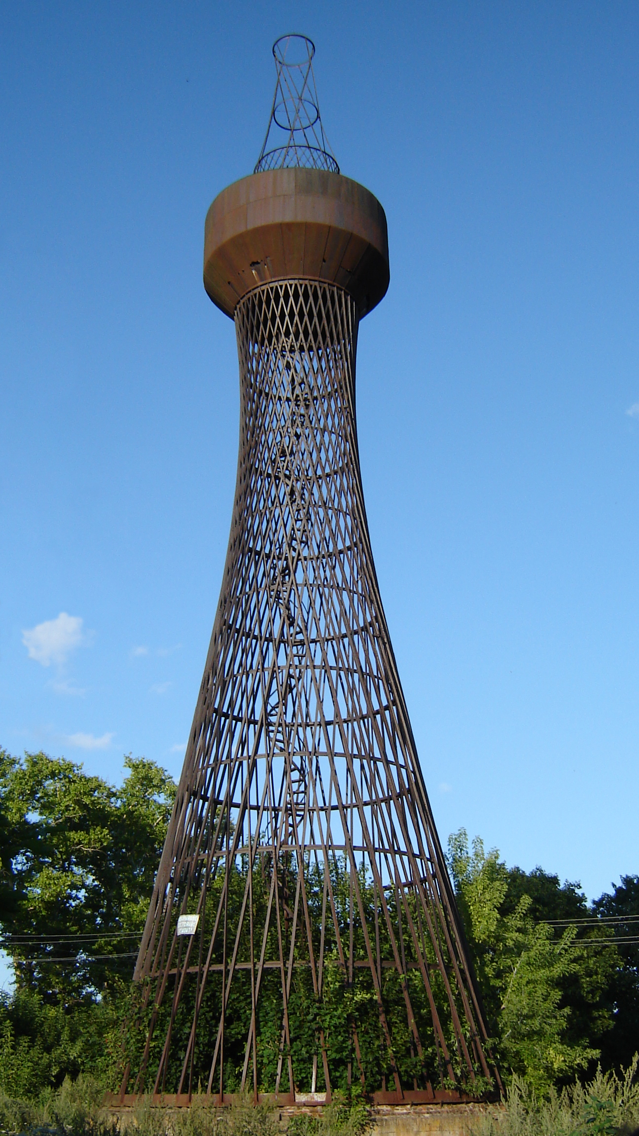 Первая в мире гиперболоидная конструкция. Башня Шухова в Полибино Липецкой области